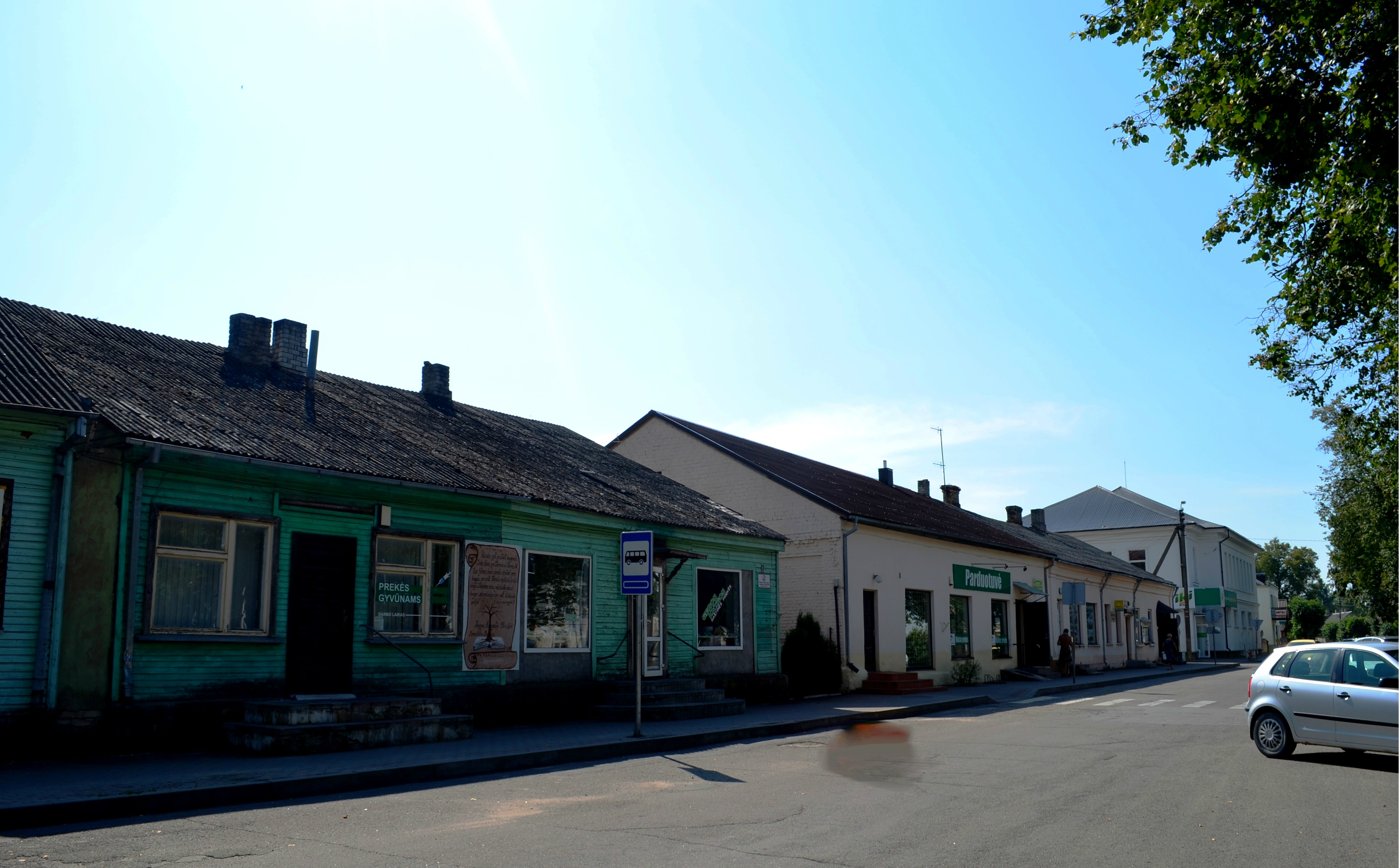 Ramygalos centras, Panevėžio r.